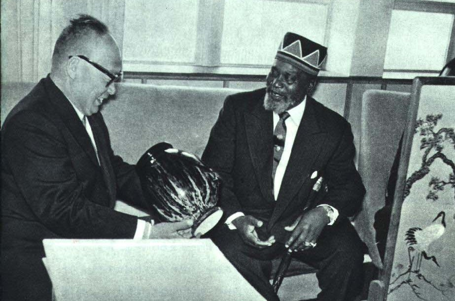 1964-02 1963年12月10日 陈毅访问肯尼亚 与总理乔莫·肯雅塔会面